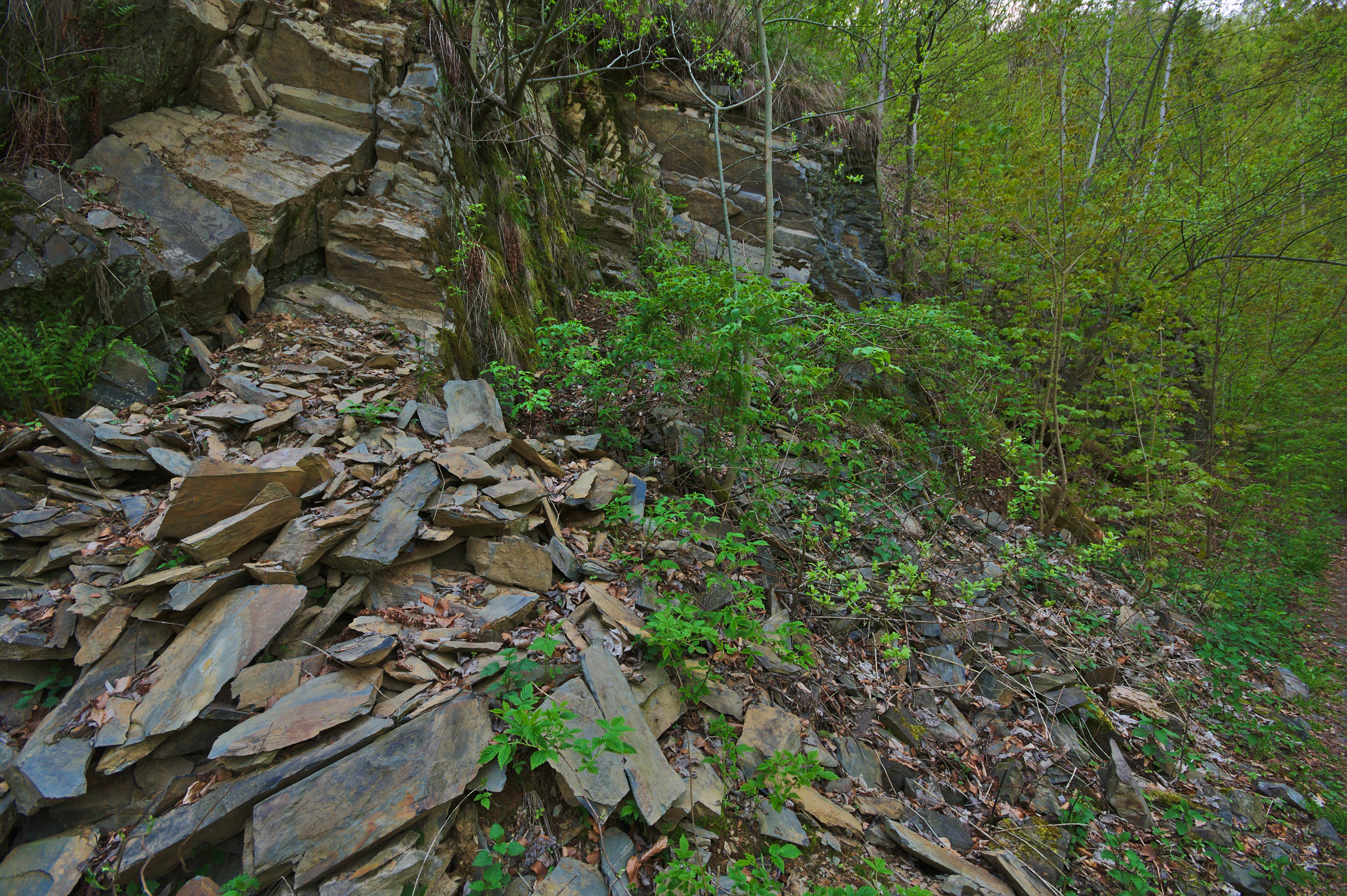 Přírodní rezervace Hrubovodské sutě, okres Olomouc